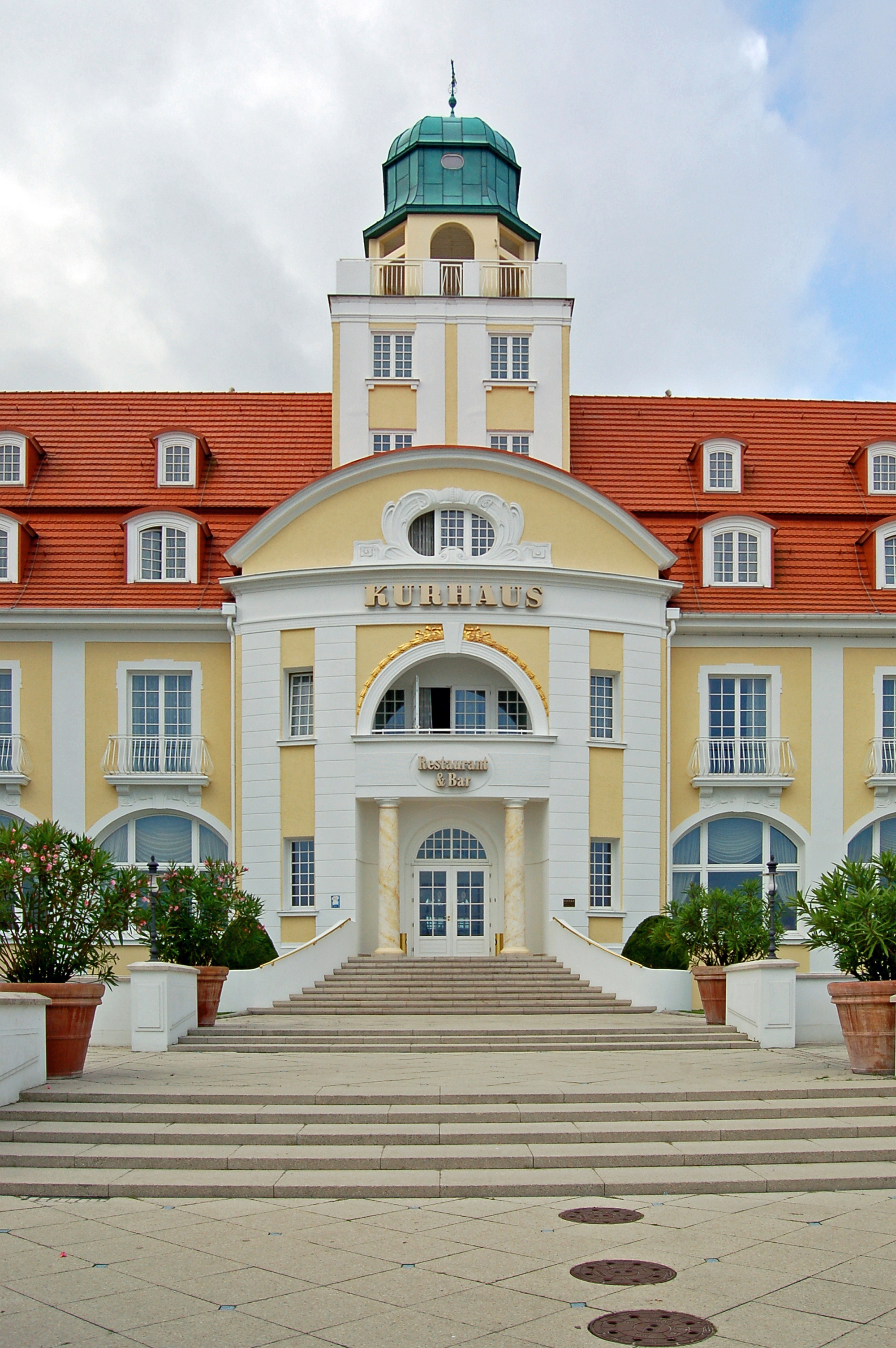 Das Kurhaus steht direkt an Strandpromenade und Kurplatz in unmittelbarer Nähe der Seebrücke. Es wurde von Berliner Bankiers erbaut und am 22. Juli 1890 eröffnet. Es brannte jedoch am 1. Mai 1906 ab. Im Sommer 1907 wurde vom Gemeinderat ein Neubau beschlossen (das heutige Gebäude). Dieser diente dann ab den 20er Jahren der damaligen High Society als Unterhaltungs- und Amüsier-Tempel. Vor und in den Kriegsjahren und auch danach war dann Schluss mit lustig. 1960 übernahm das DDR-Reisebüro das Kurhaus. Somit stand es allen Bürgern wieder offen. Es ist das imposanteste Gebäude an der Promenade und der Blickfang schlechthin. Heute ist es ein Luxus-Hotel. Eine ganz seltene Aufnahme; ohne Touri, denn da latscht (fast) immer ein Touri umher.